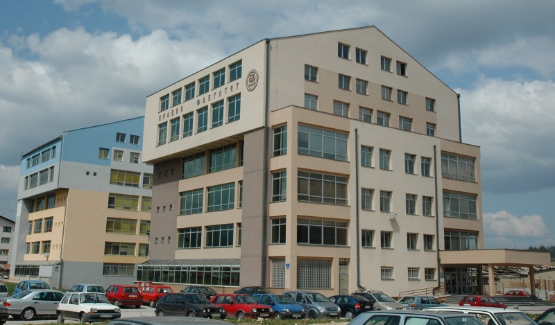 Факултети на Палама